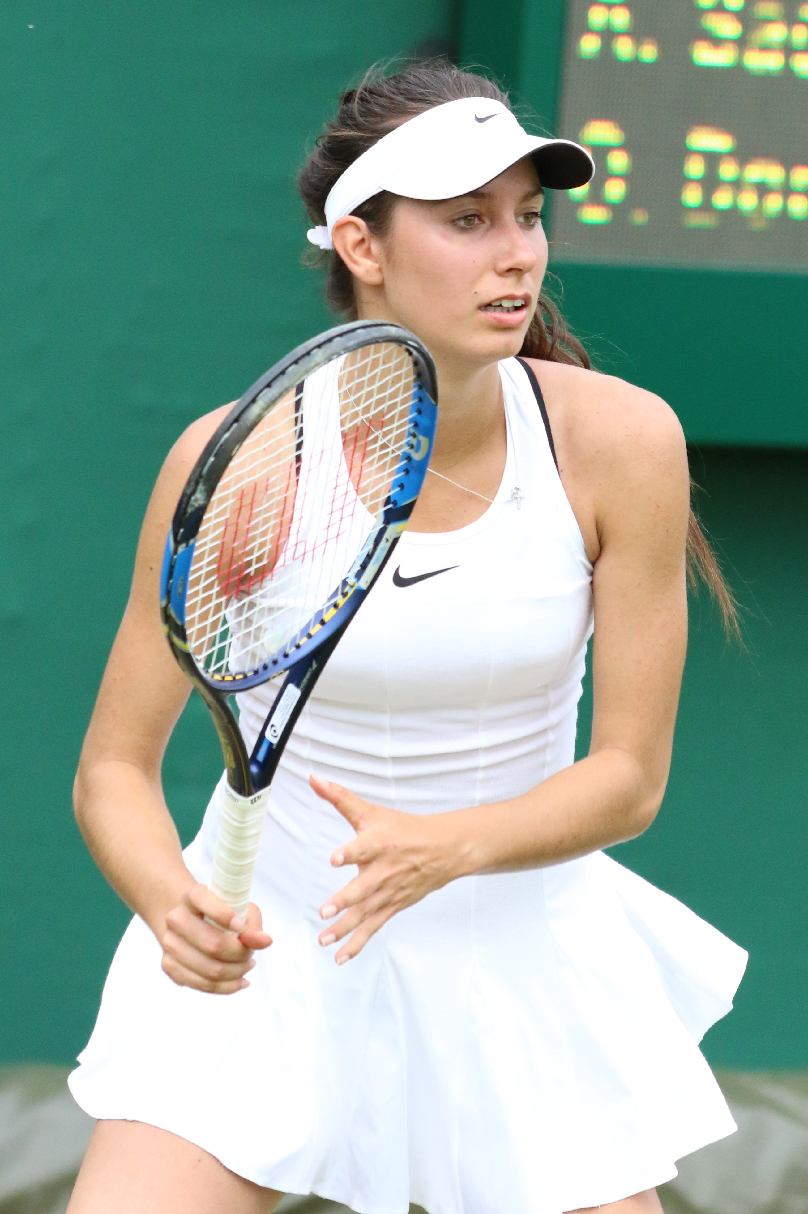 Dodin WMQ16 (8)